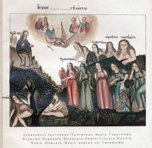 Трясавицы (дочери царя Ирода, персонификация лихорадок) со св. Сисинием, четырьмя евангелистами и архангелом Михаилом. Русская народная икона (Лубок). Музей антропологии и этнографии, Санкт-Петербург. Иллюстрация из книги «История русской литературы», под редакцией Е.В. Аничкова, А.К. Бороздина и А.Н. Овсянико-Куликовского — Москва, 1908